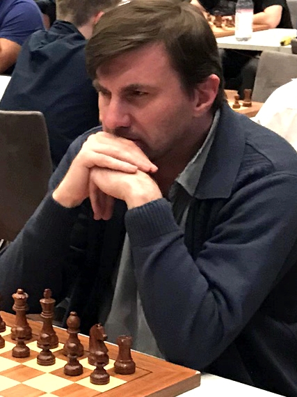 Vadim Malakhatko, Runde 9 der Grenke Chess Open 2019 in Karlsruhe.